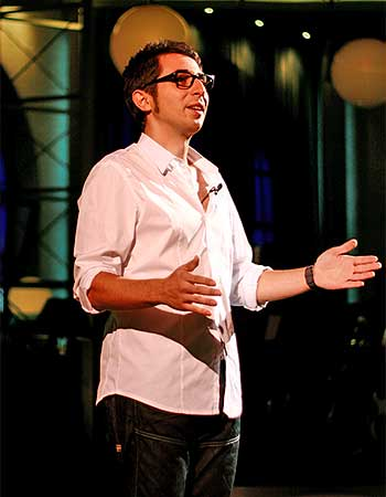 Berto, colaborador de Buenafuente